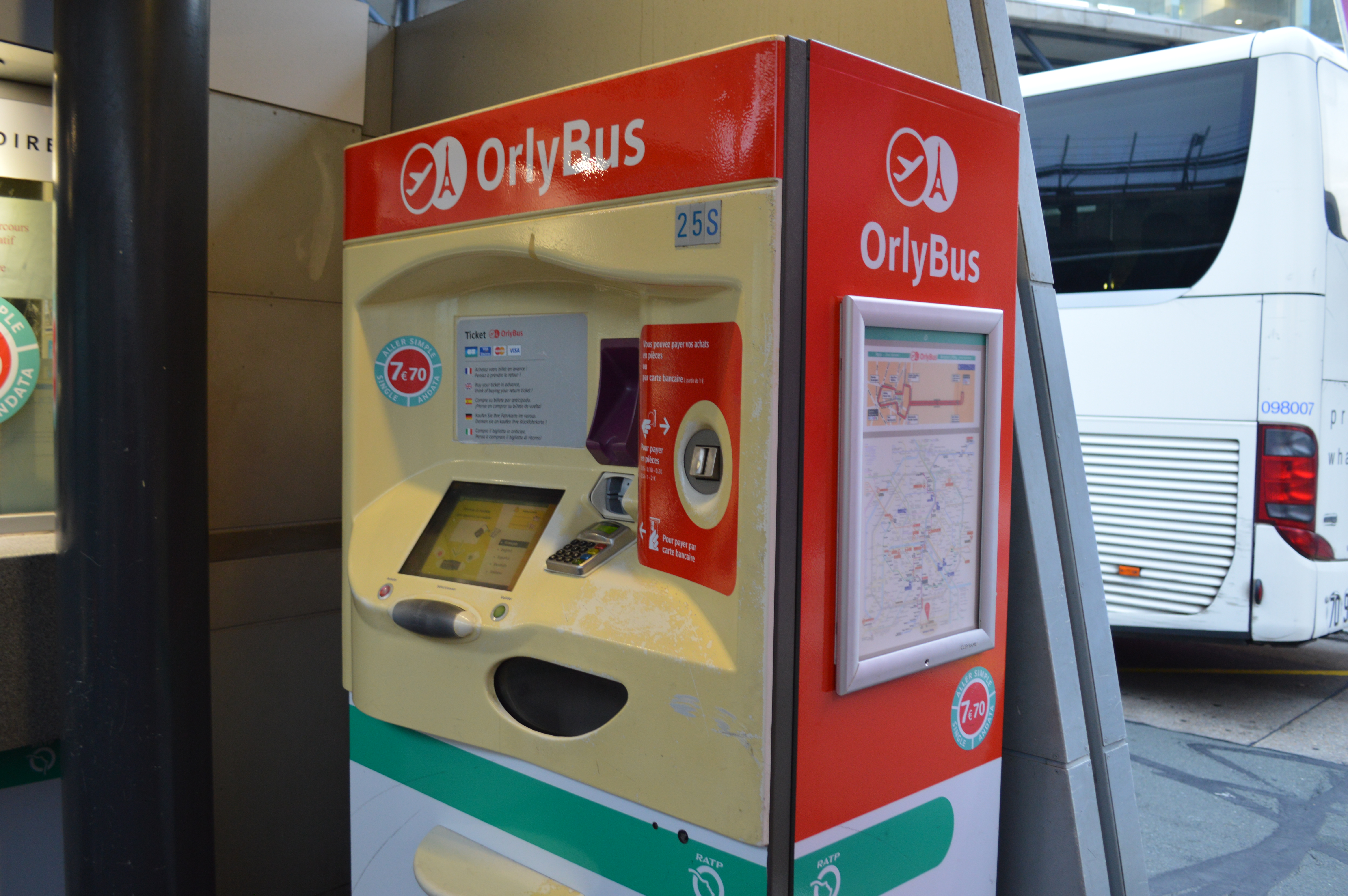 Automate Orlybus photographié au terminus de la ligne à Orly-Sud.